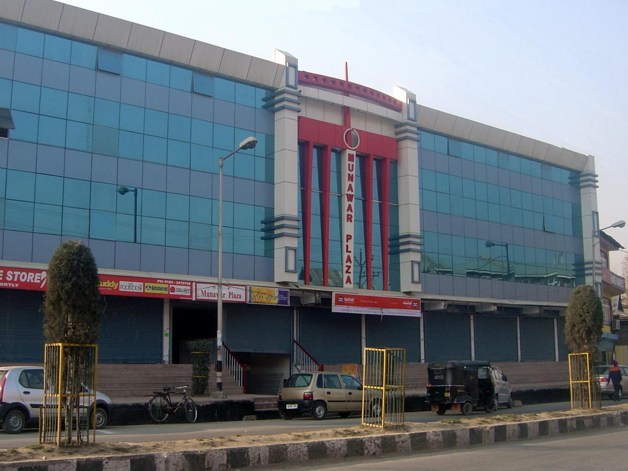 MunawarPlaza